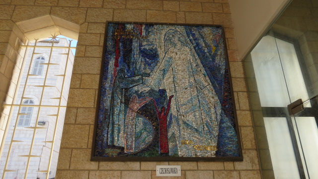 Basilica of the Annunciation, Nazareth, Israel